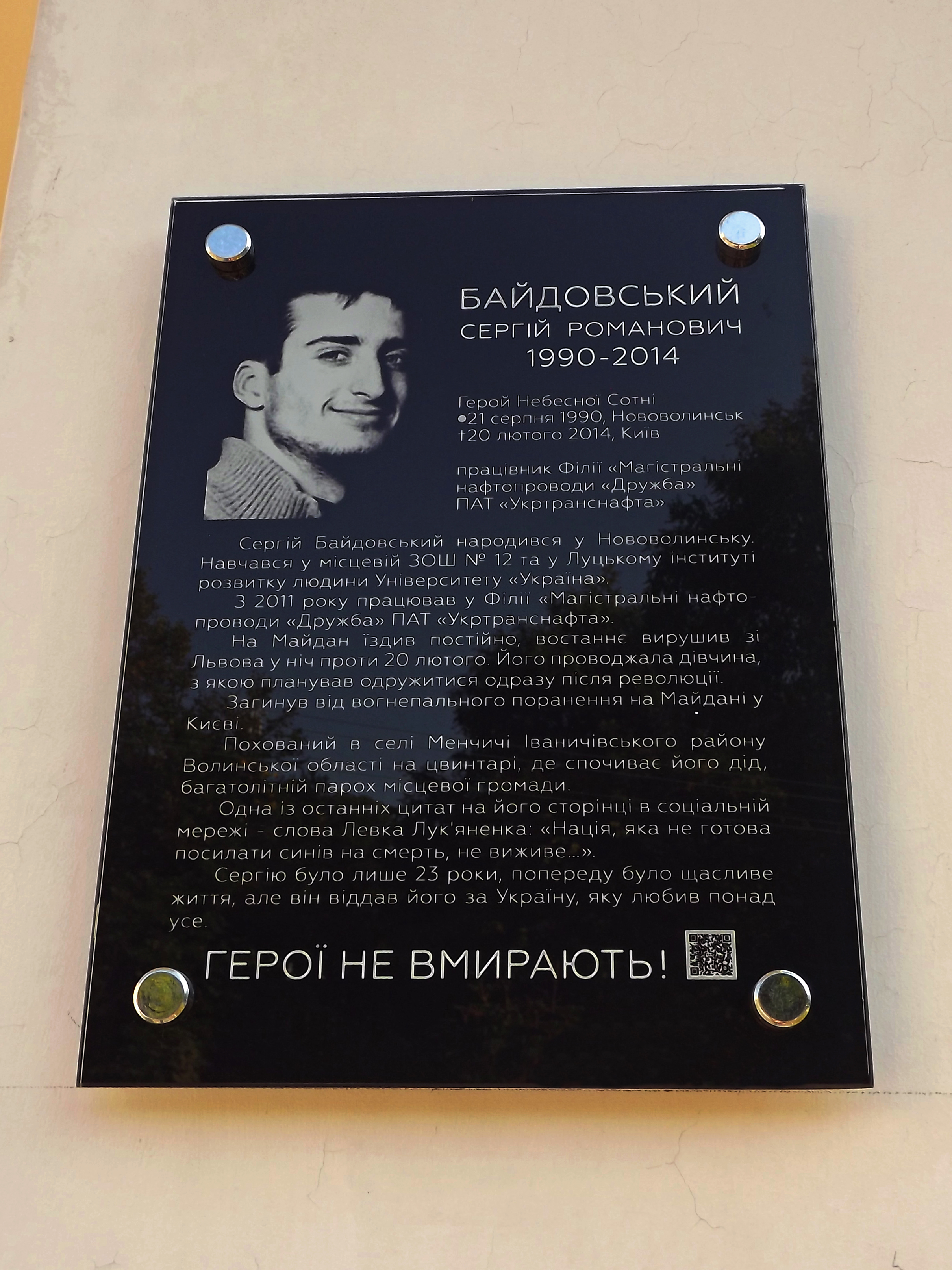 Палац, Дрогобич, вул. Т. Шевченка, 12